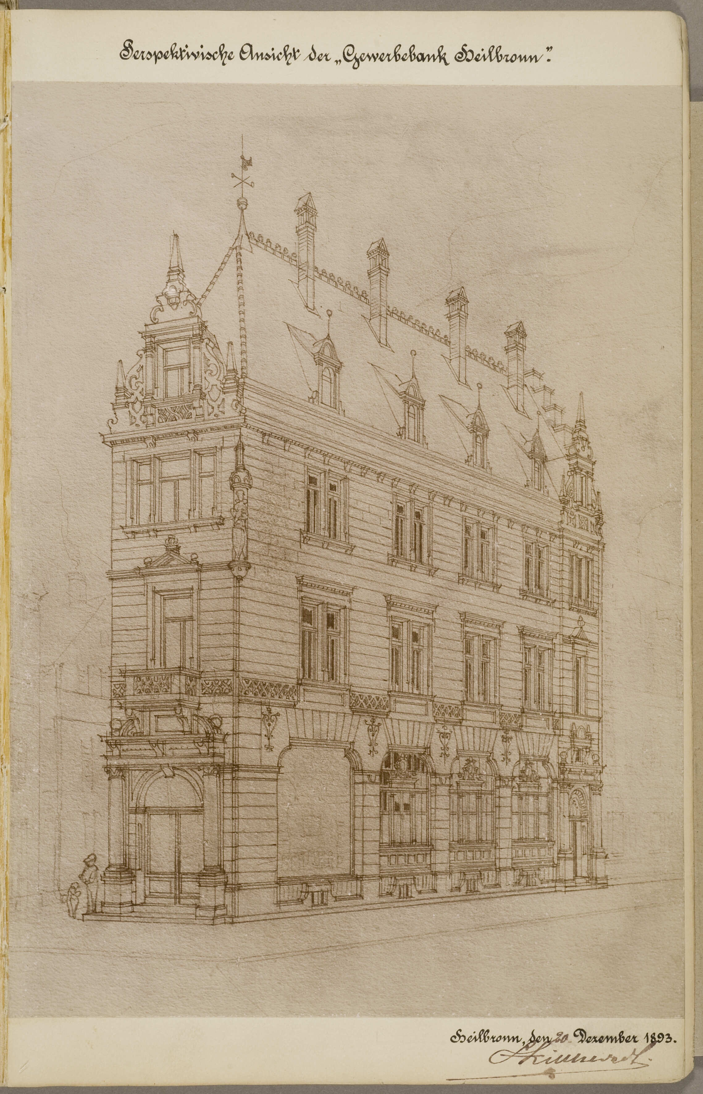 Heilbronn Haus Kaiserstraße 27 Bauherr: Heilbronner Gewerbebank. Im Jahre 1902 an Adolf Grünwald und Sigmund Abraham verkauft. Wegen seines Grundrisses wurde das Gebäude auch als das sog. Hufeisenhaus bezeichnet.